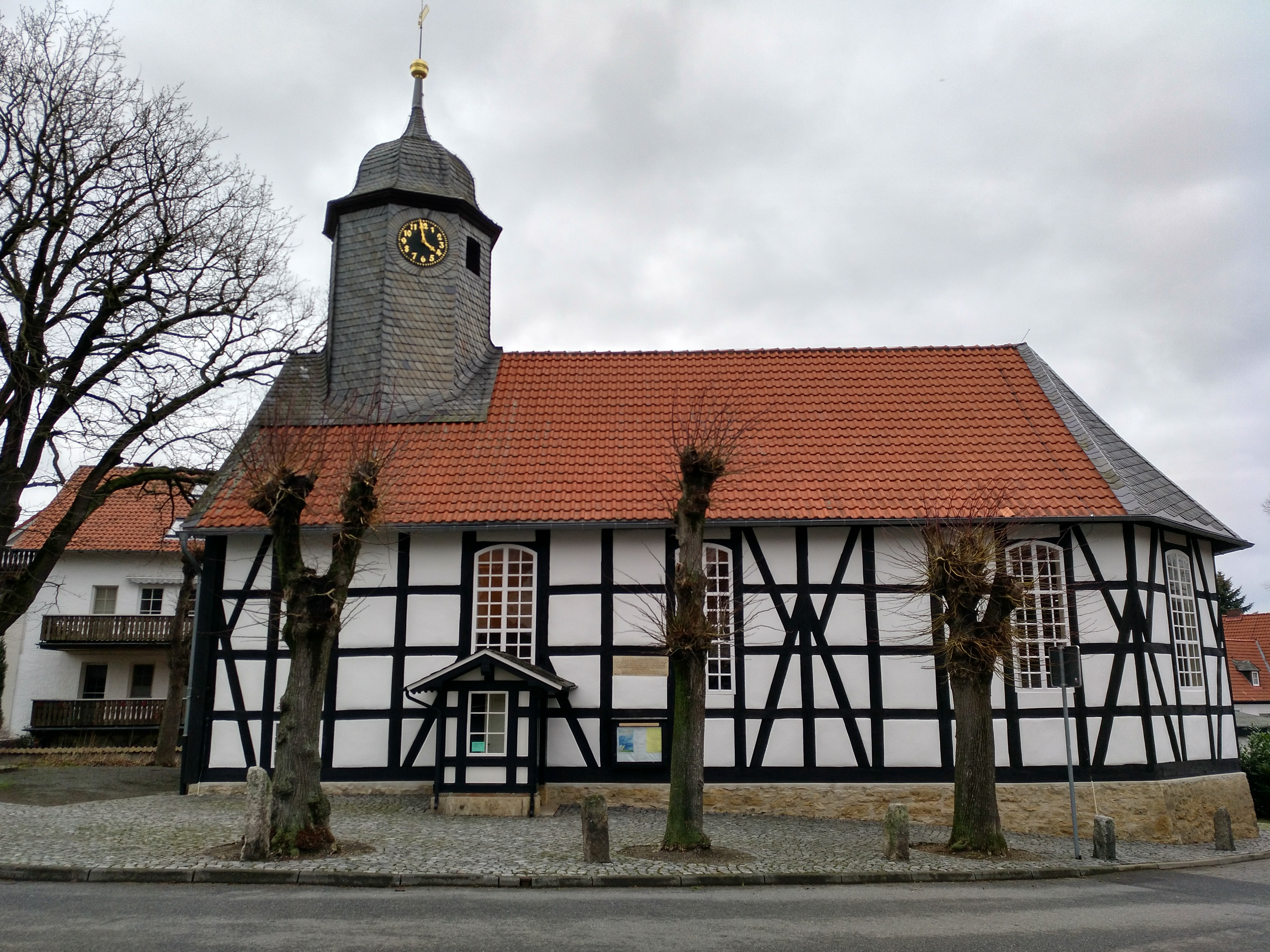 Blick auf den Südflügel der Schlewecker Dorfkirche.